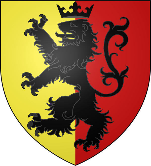 Coupé au 1 d'or; au 2 de gueules; au lion de sable brochant sur le tout armé, lampassé et couronné de même.